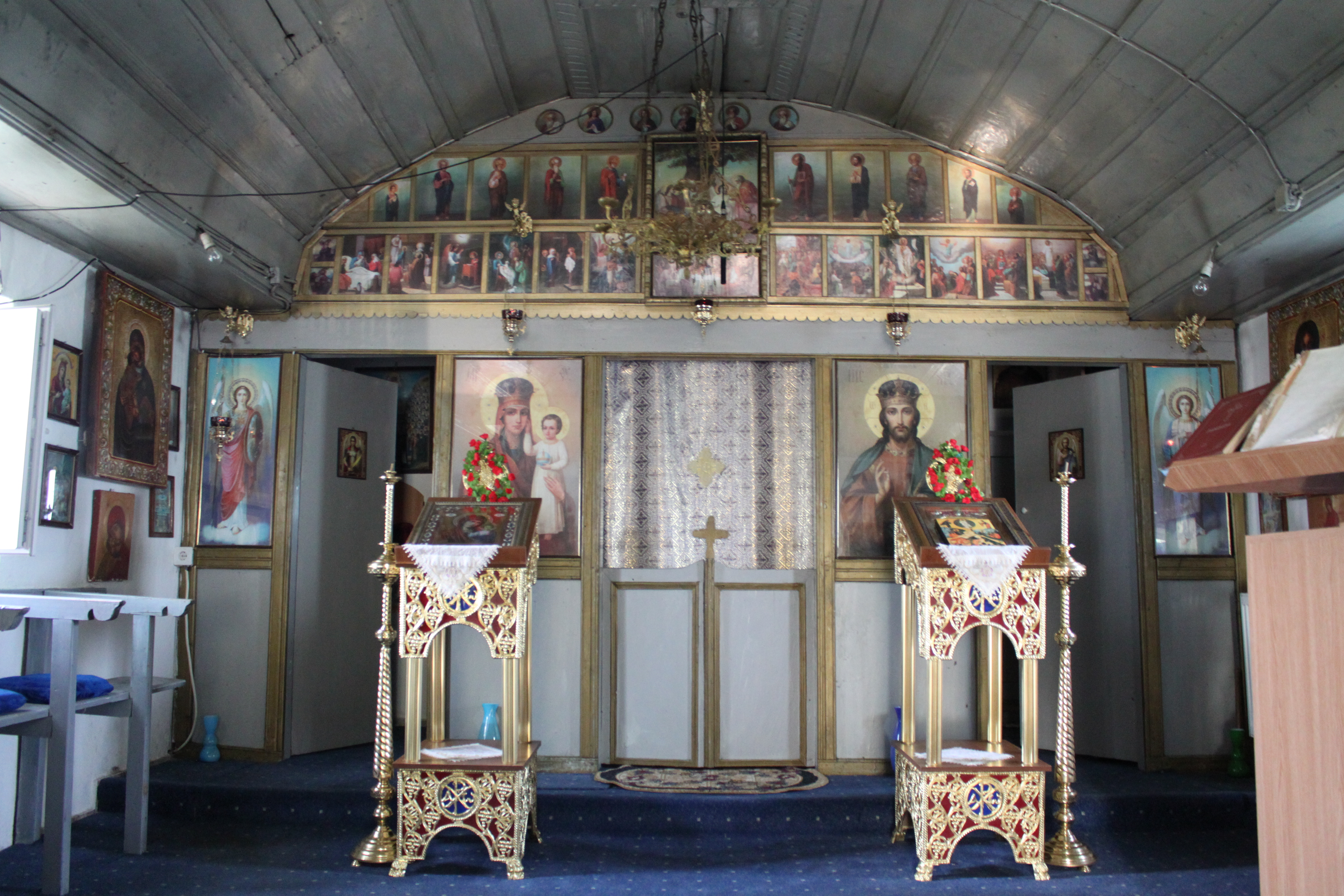 Biserica de lemn din Strunga, judeţul Constanţa.